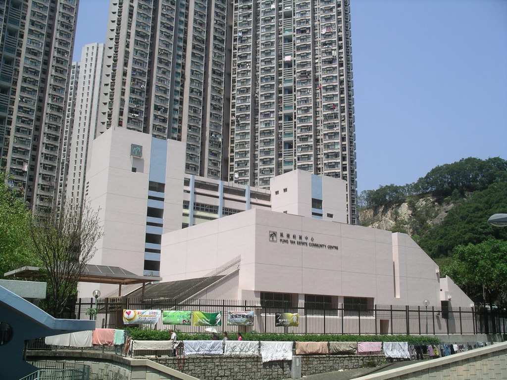 Fung Tak Estate Community Centre, Hong Kong